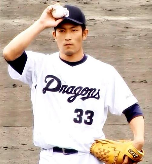 祖父江大輔 2014年2月19日ヤクルト戦（練習試合）初登板。北谷球場。